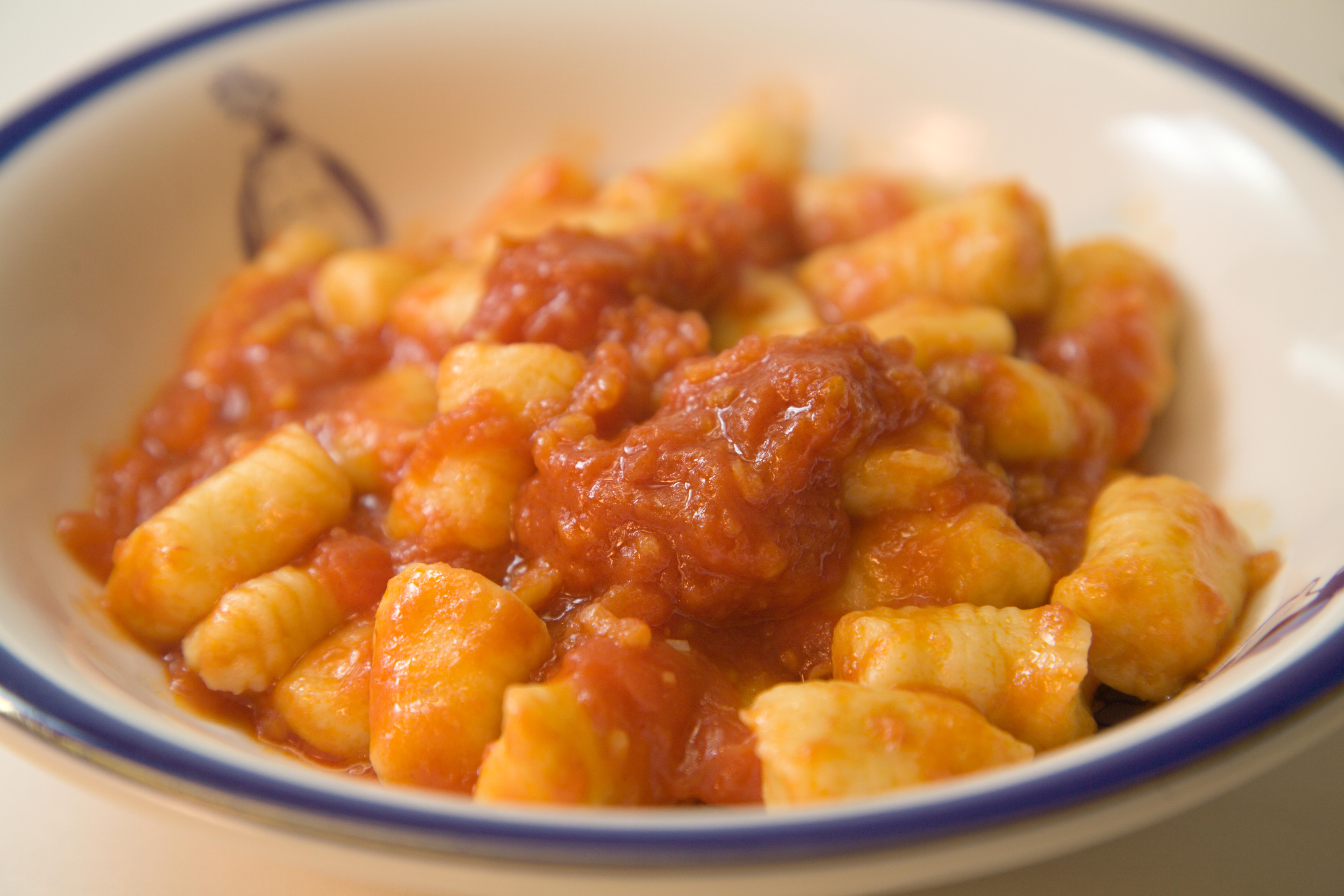 Gnocchi al Pomodoro Needs additional description